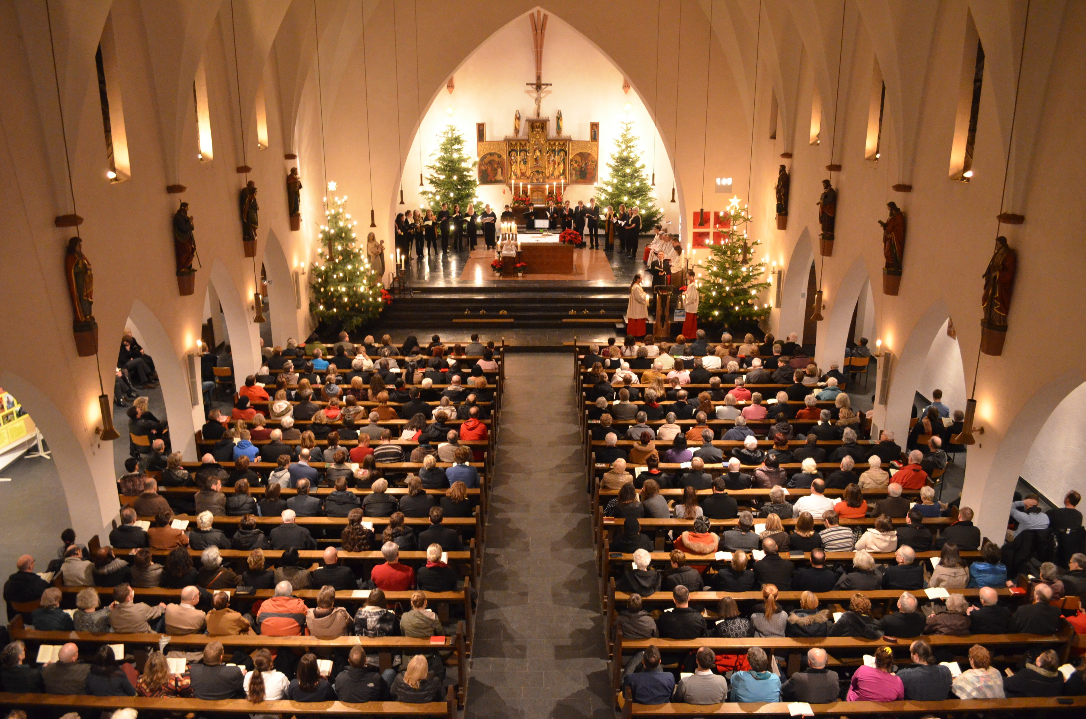 Christmette in der katholischen St.-Josefskirche in Frankfurt am Main-Bornheim